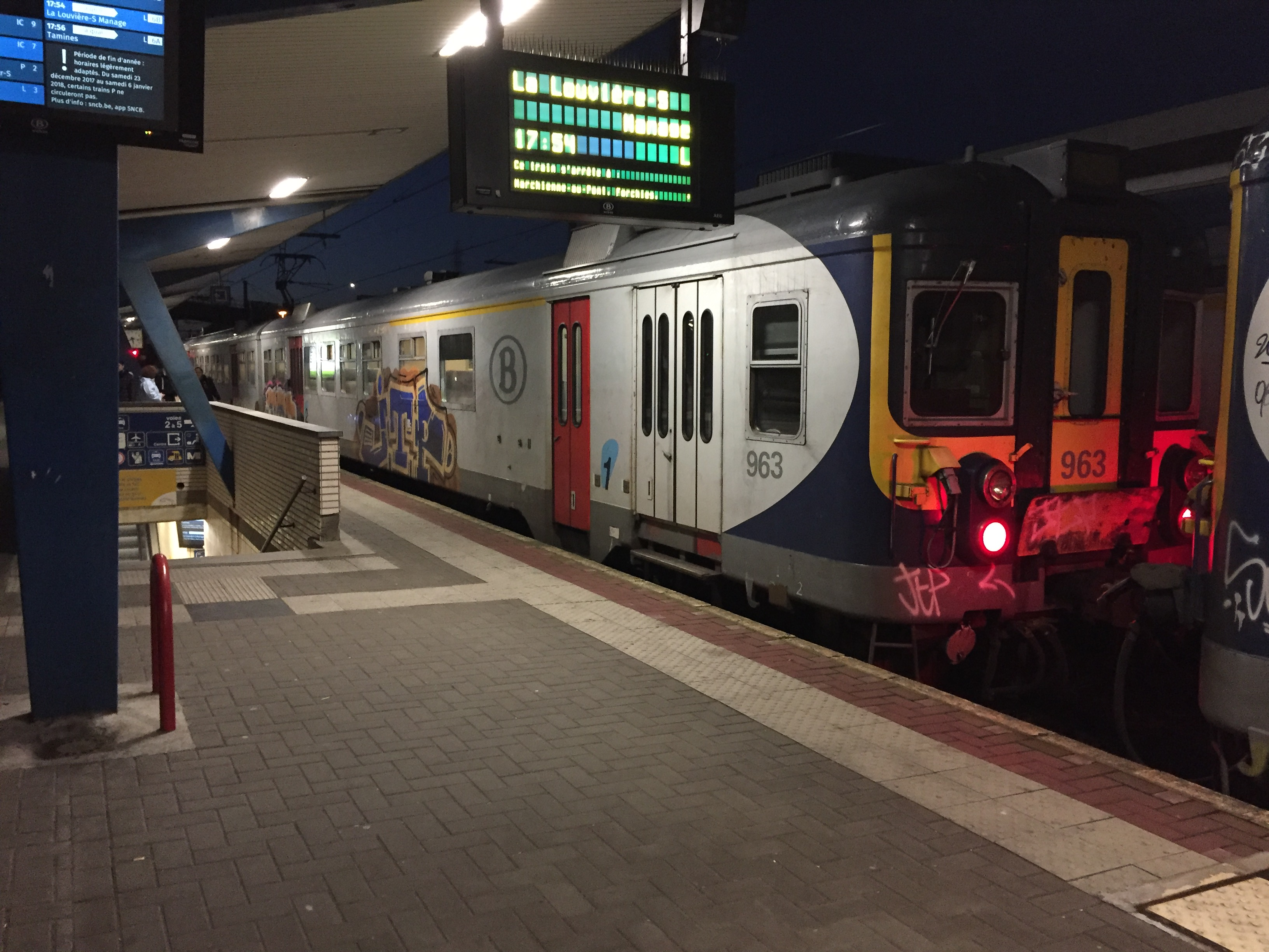 AM Converted - Gare de Charleroi-Sud